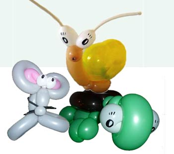 Die Arbeiten eines Luftballonkünstlers